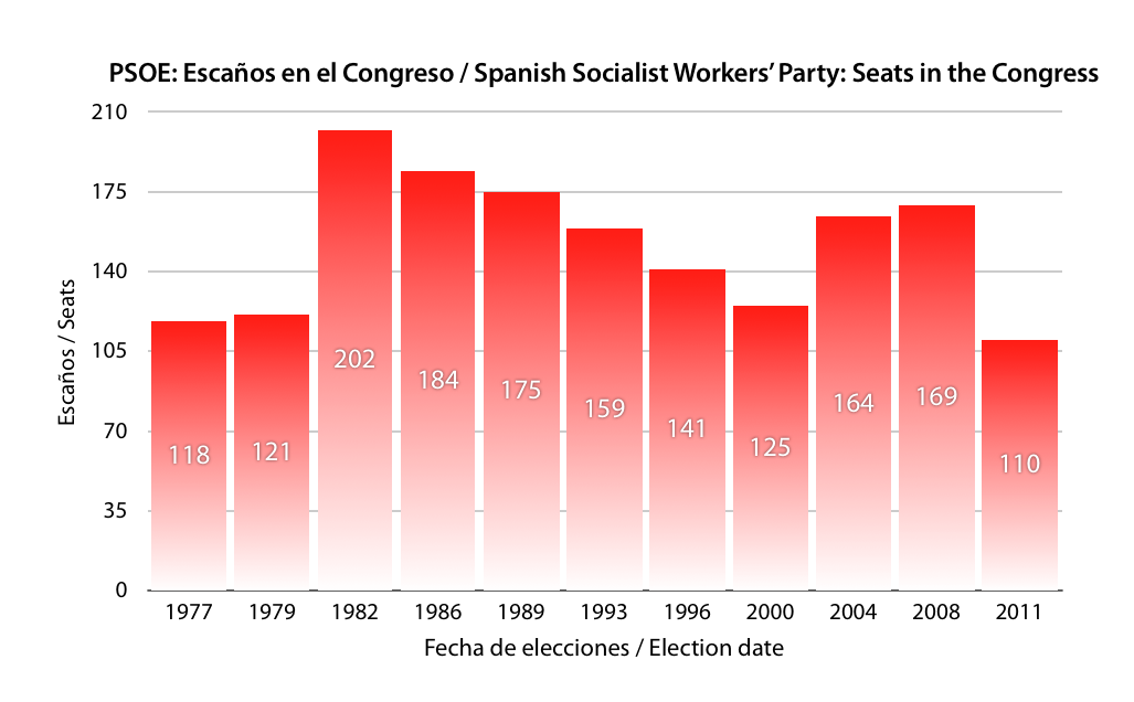 Gráfico sobre la evolución del Partido Socialista Obrero Español (PSOE) en las Elecciones Generales españolas. (1977-2008) Autor: Trabajo propio.